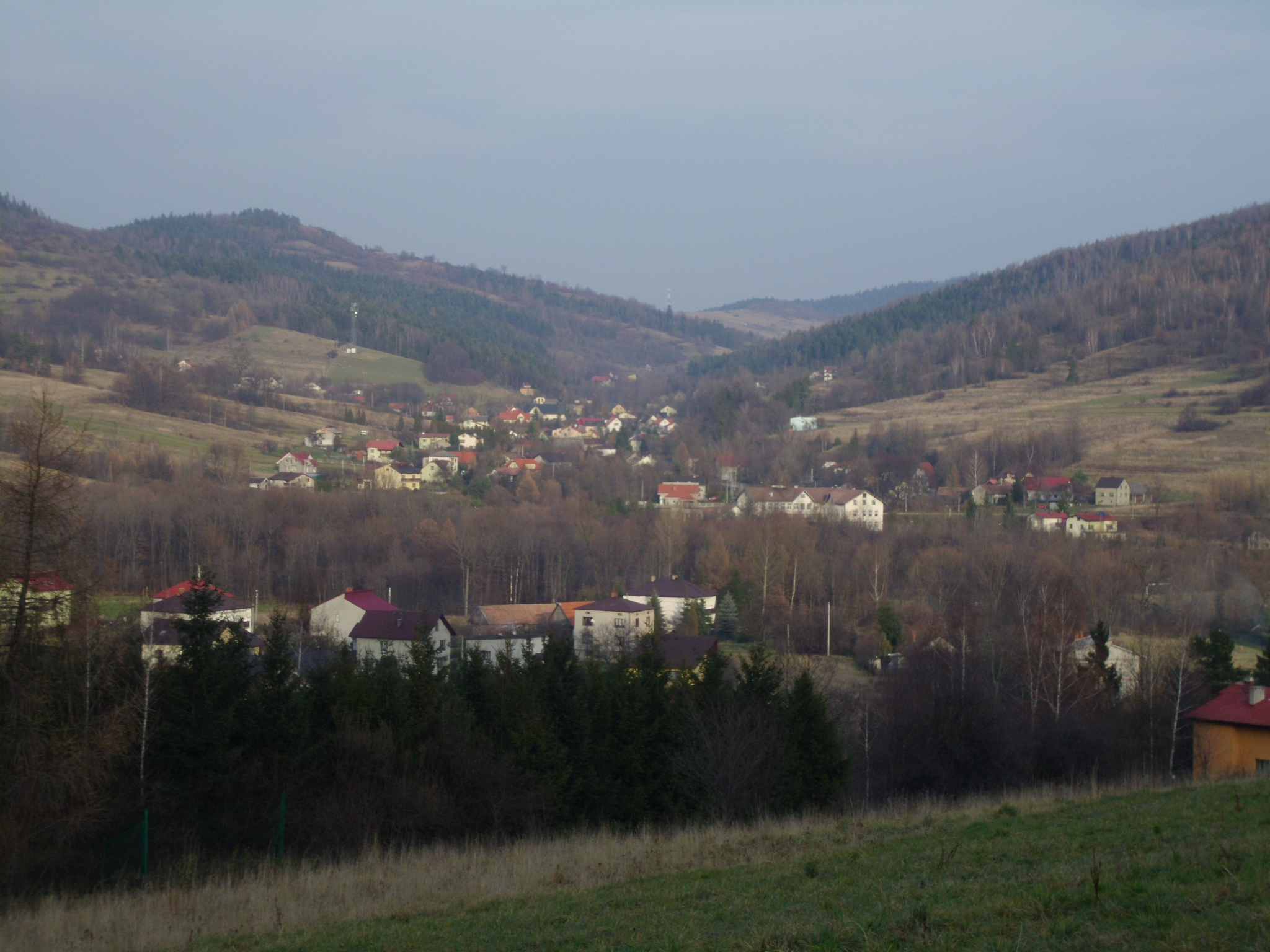 Wieś Pewel Mała, widok ze Świnnej/Komarnika, 2012